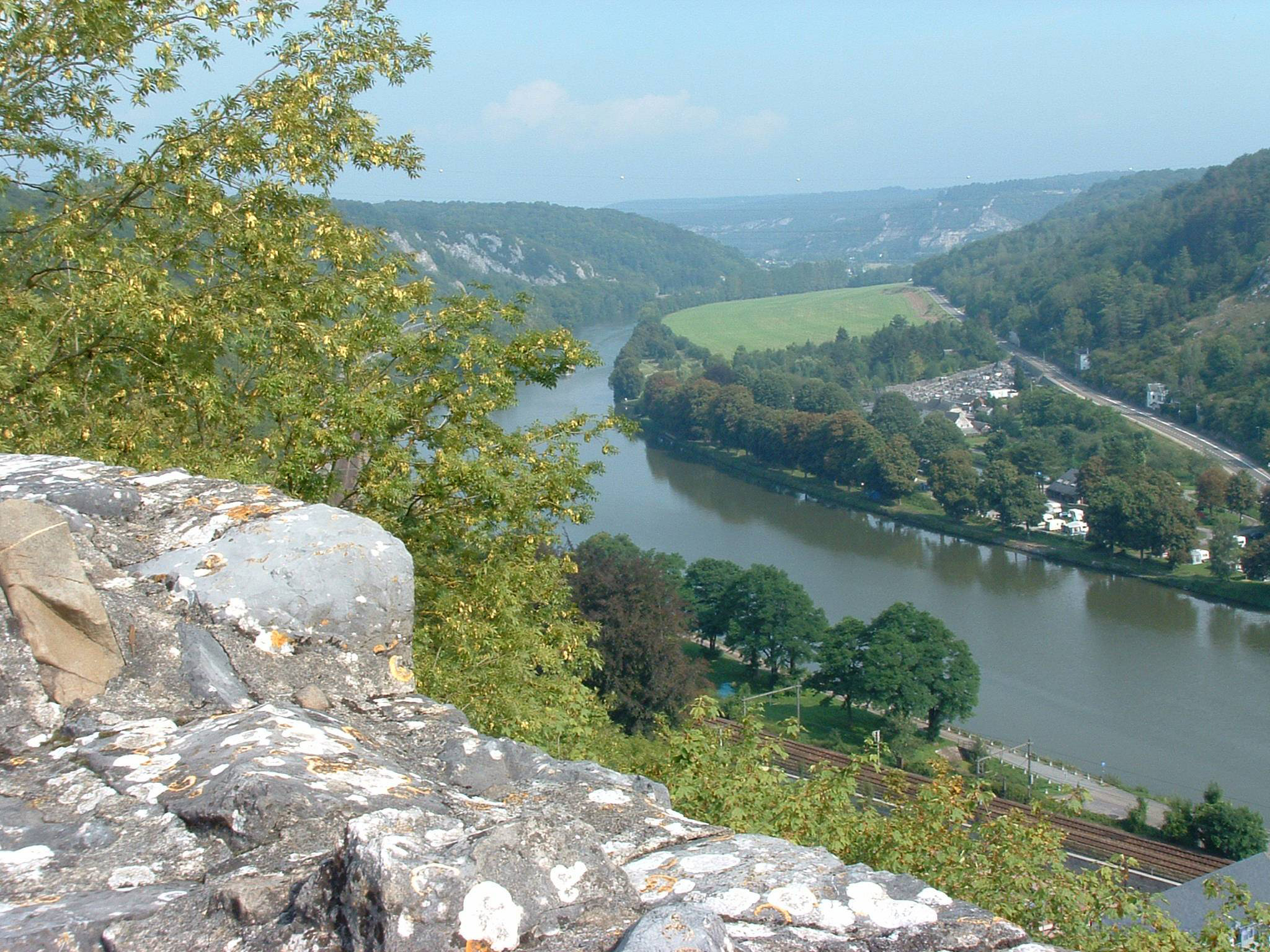 Het kasteel van Crèvecoeur beheerst de schitterende Maasvallei (23/08/2006)